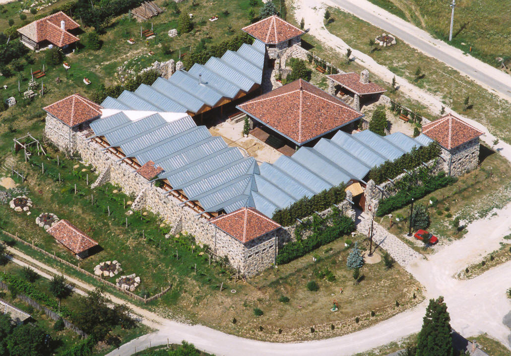 Várszínház - Cserszegtomaj - Hungary - Europe